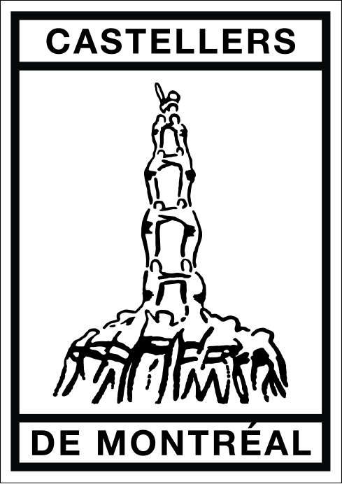 Escut dels Castellers de Montréal